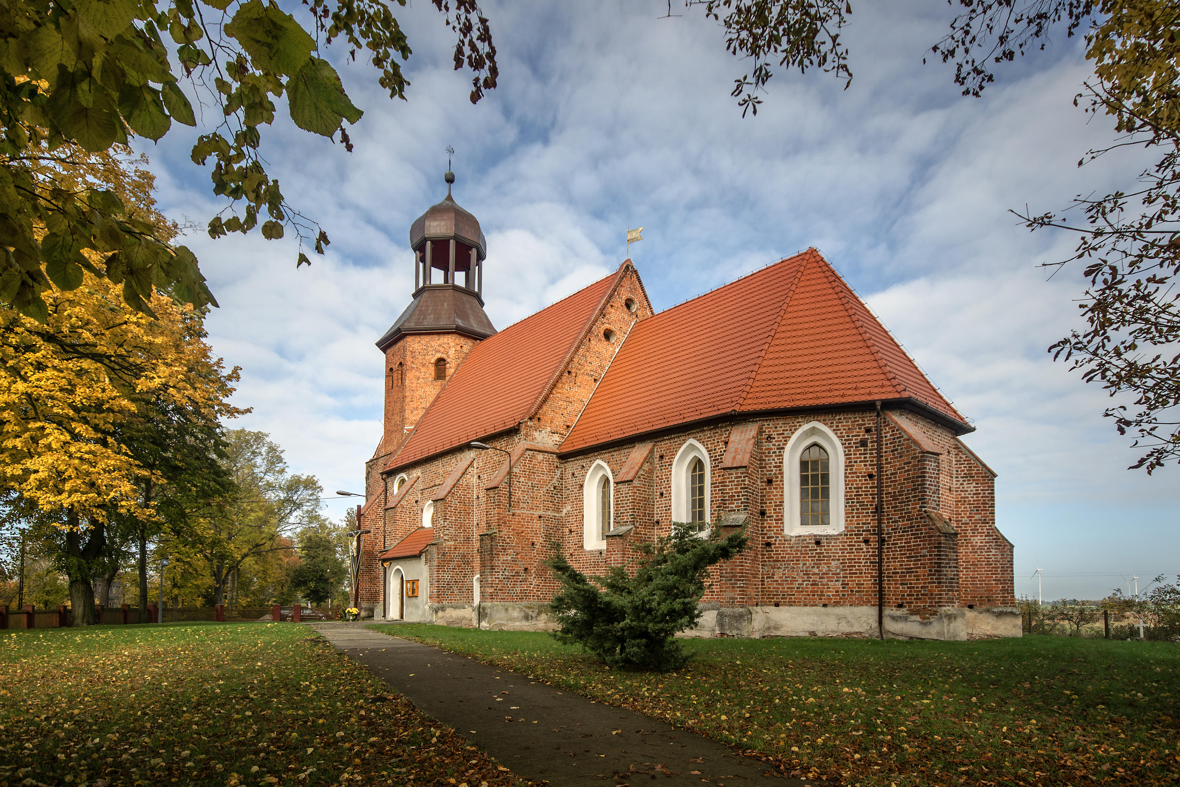 Wojciechów, kościół fil. p.w. św. Elżbiety, XV, XVI, XVII